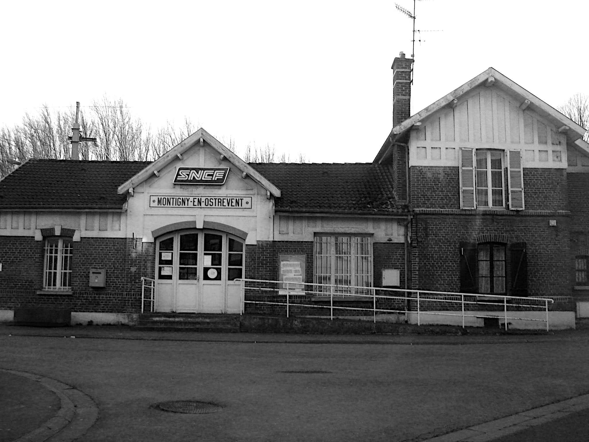 Gare Montigny-en-ostrevent